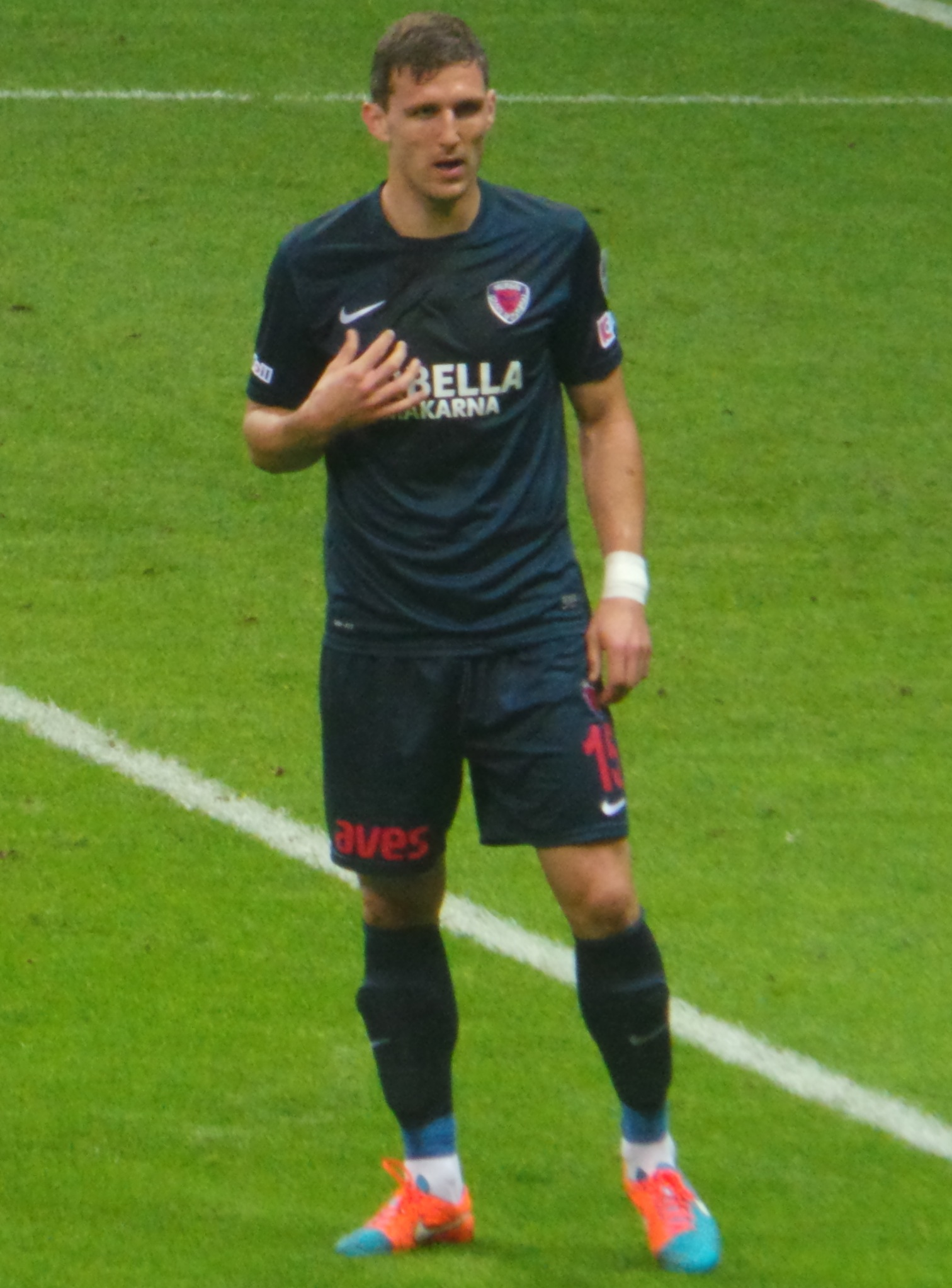 Milan Mitrović